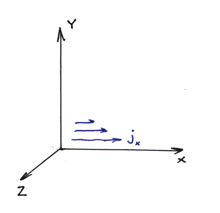 иллюстрация к статье